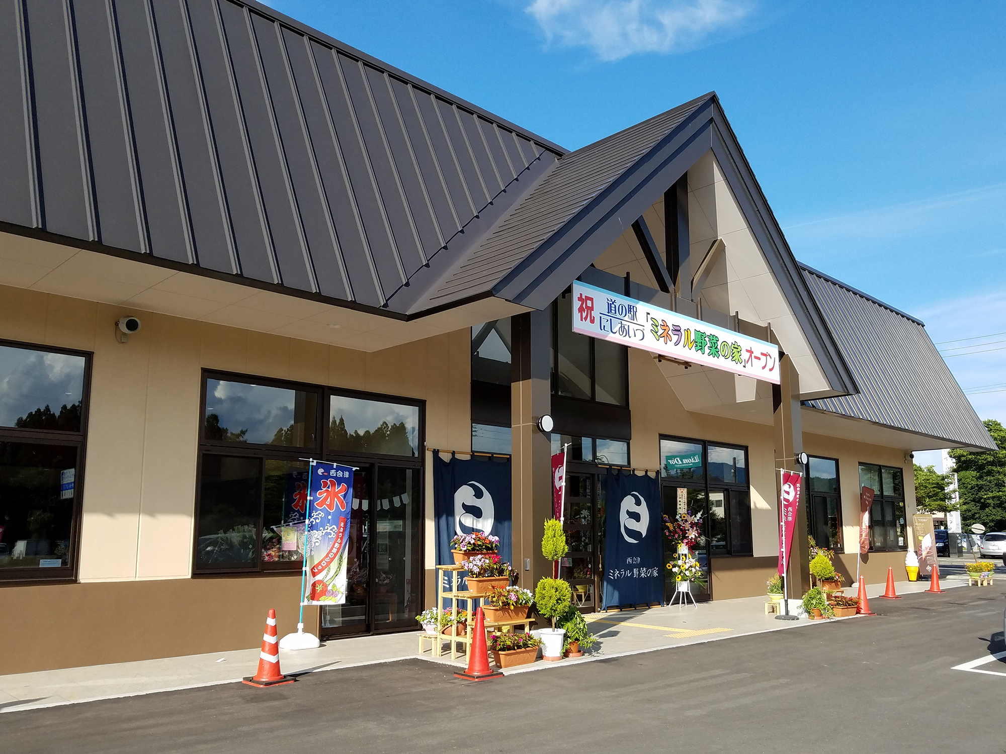 道の駅にしあいづ新館